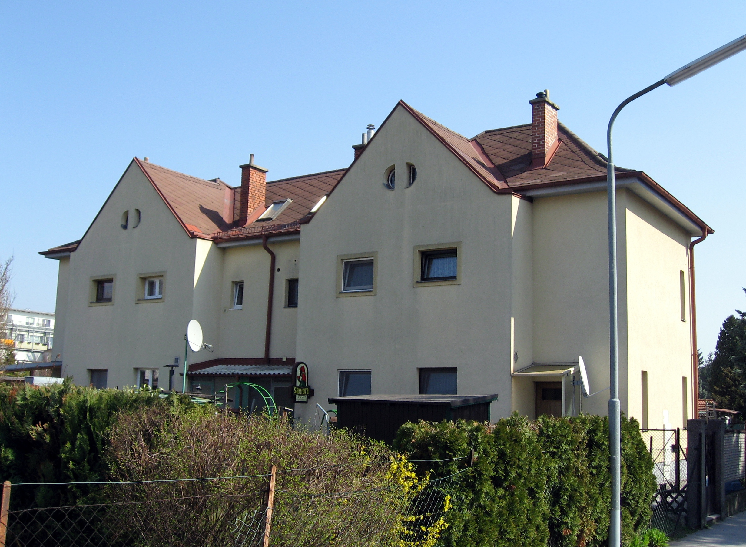 Aspern Siedlung Müllnermais